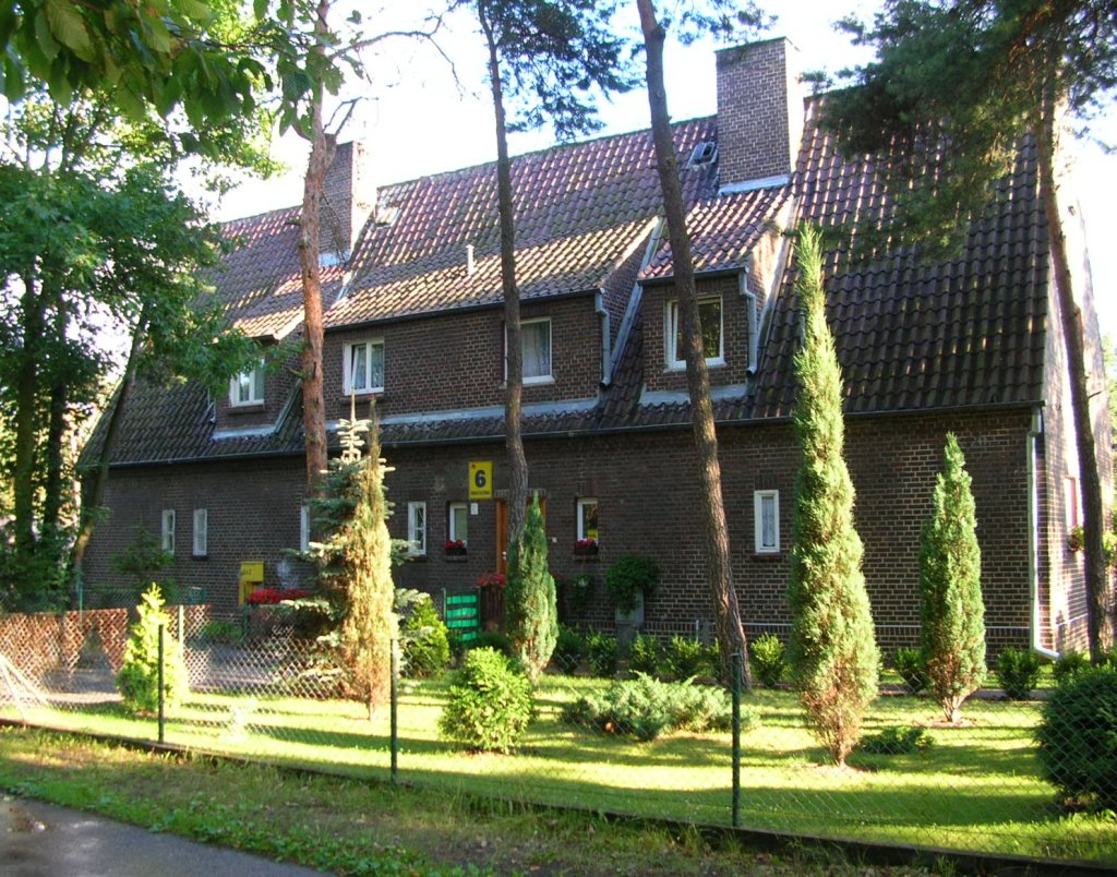 Budynek na os. Awaryjnym w Bydgoszczy